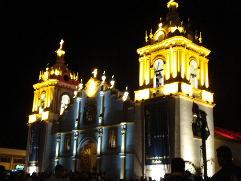 Catedral Santiago Apostol.